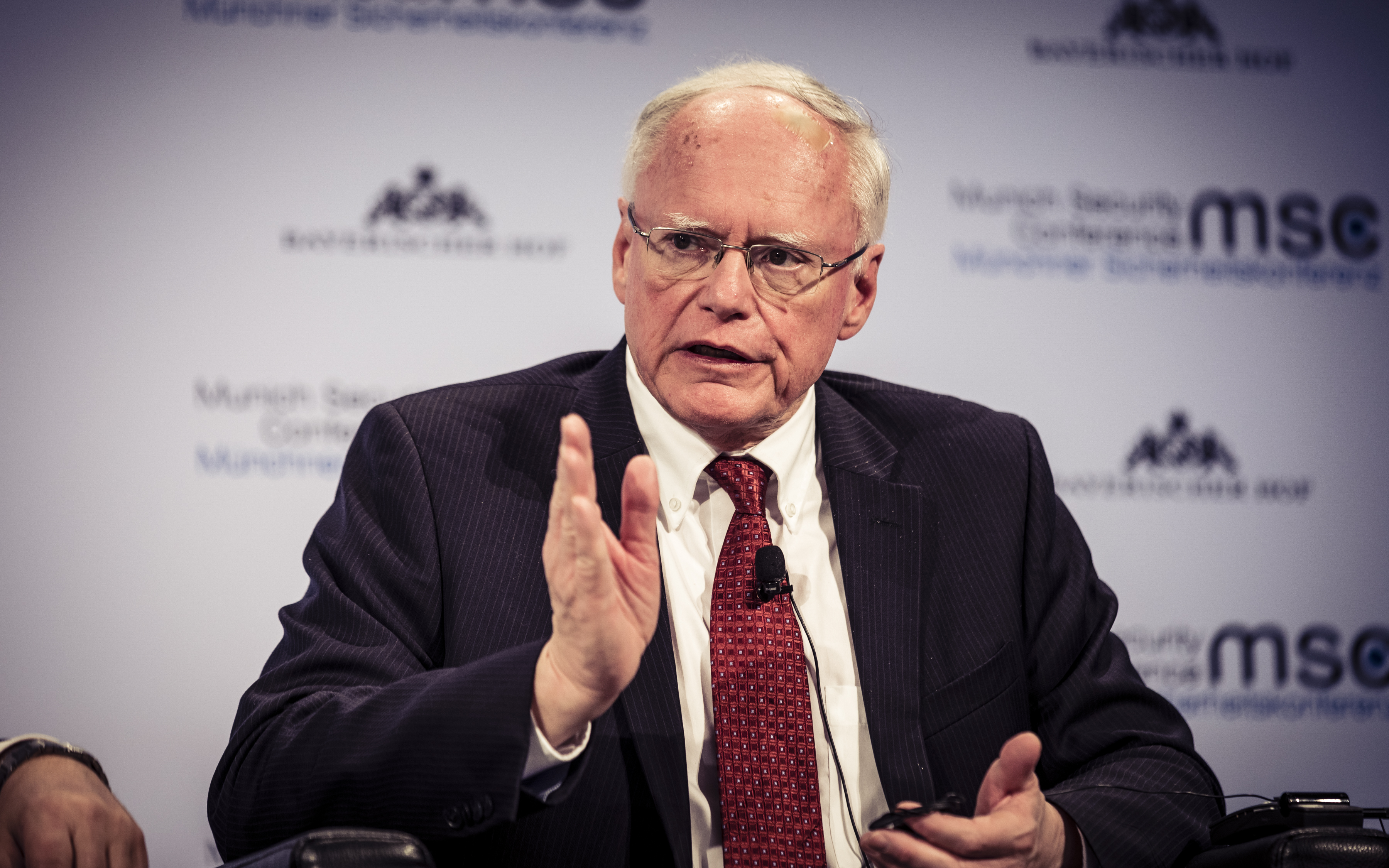 James Jeffrey während der Münchener Sicherheitskonferenz 2019